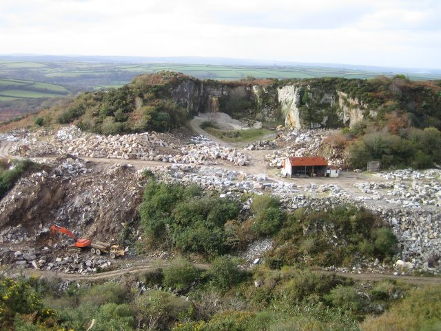 De Lank Quarries, Hantergantick